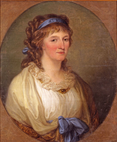 Angelika Kauffmann (1741–1807) Luise Fürstin von Anhalt-Dessau geb. von Brandenburg-Schwedt (1750–1811). Foto: Kulturstiftung DessauWörlitz, Heinz Fräßdorf.